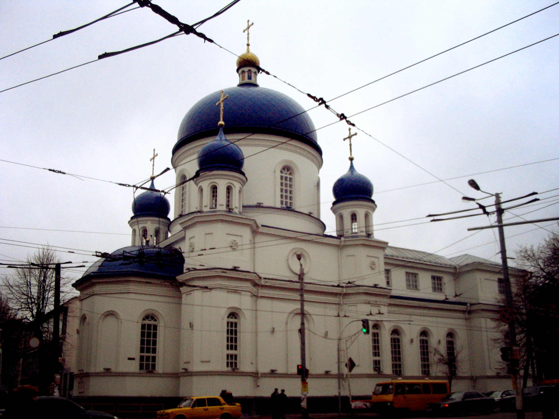 Михайлівська церква в м. Житомир